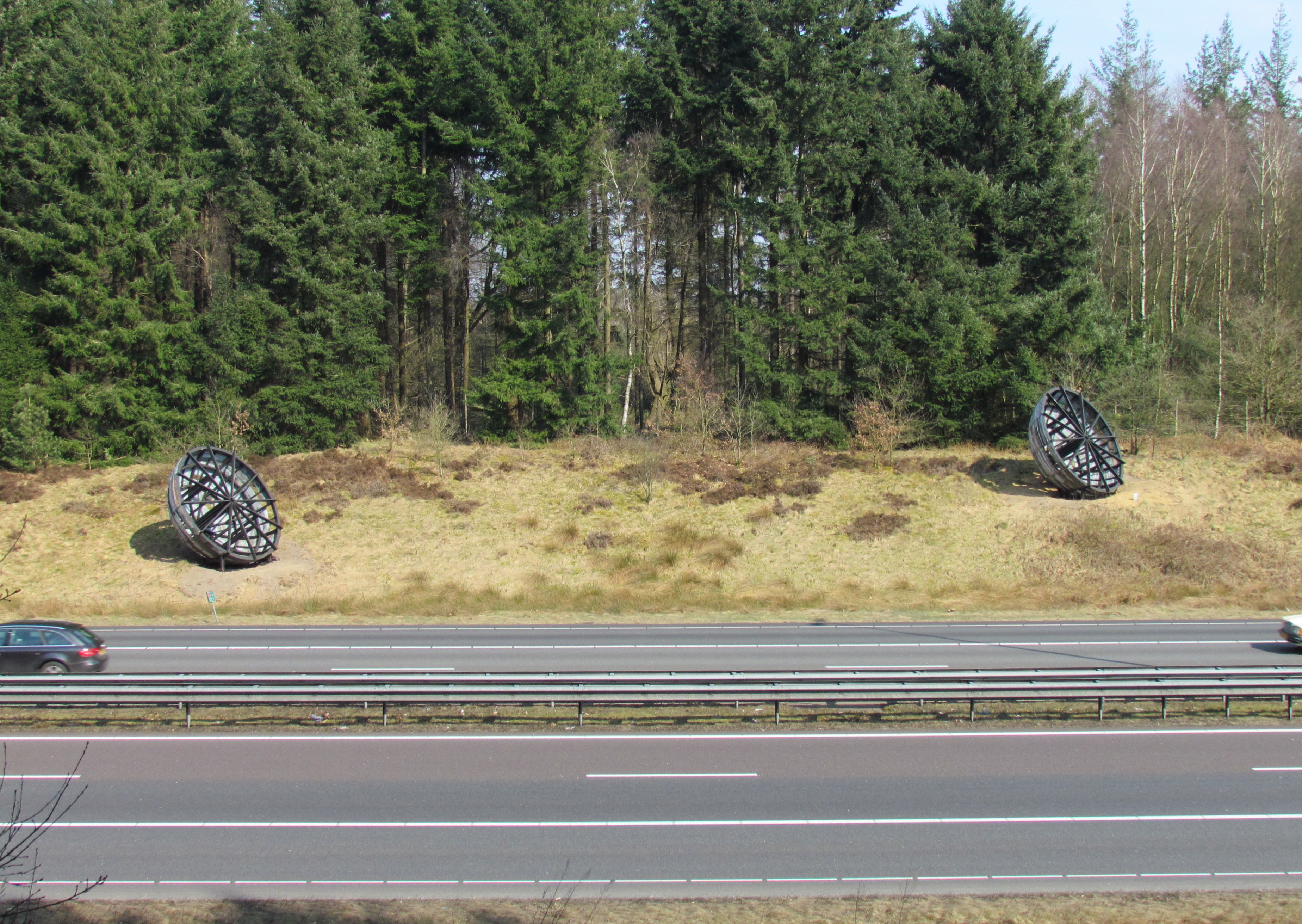 'Twee halve bollen', kunstwerk langs de Nederlandse snelweg A50 ter hoogte van het ecoduct 'De Woeste Hoeve' (Joos Clijsen, 1989)